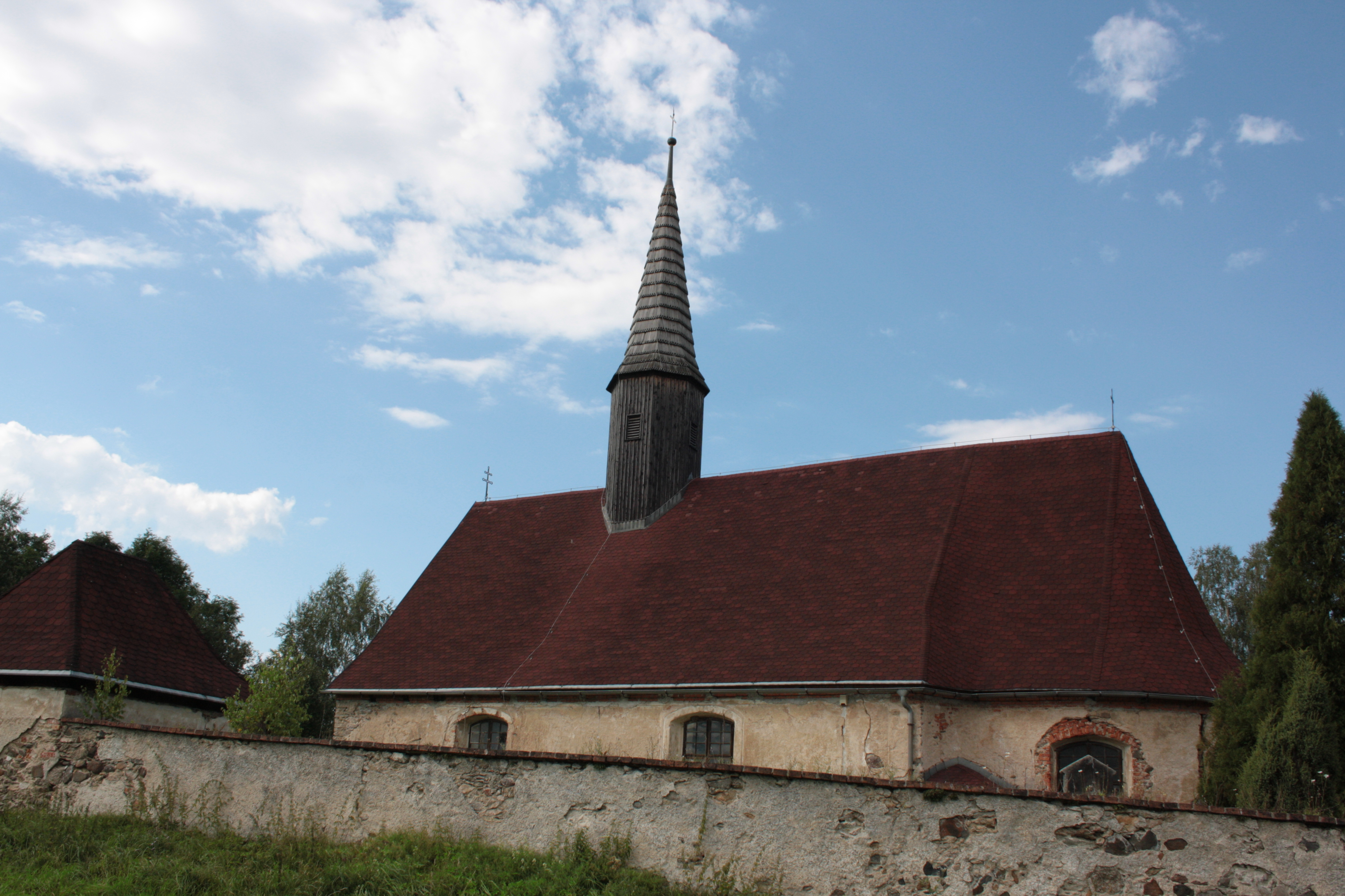 Kostel svatého Martina v Dolním Oldřiši (pohled od jihovýchodu).